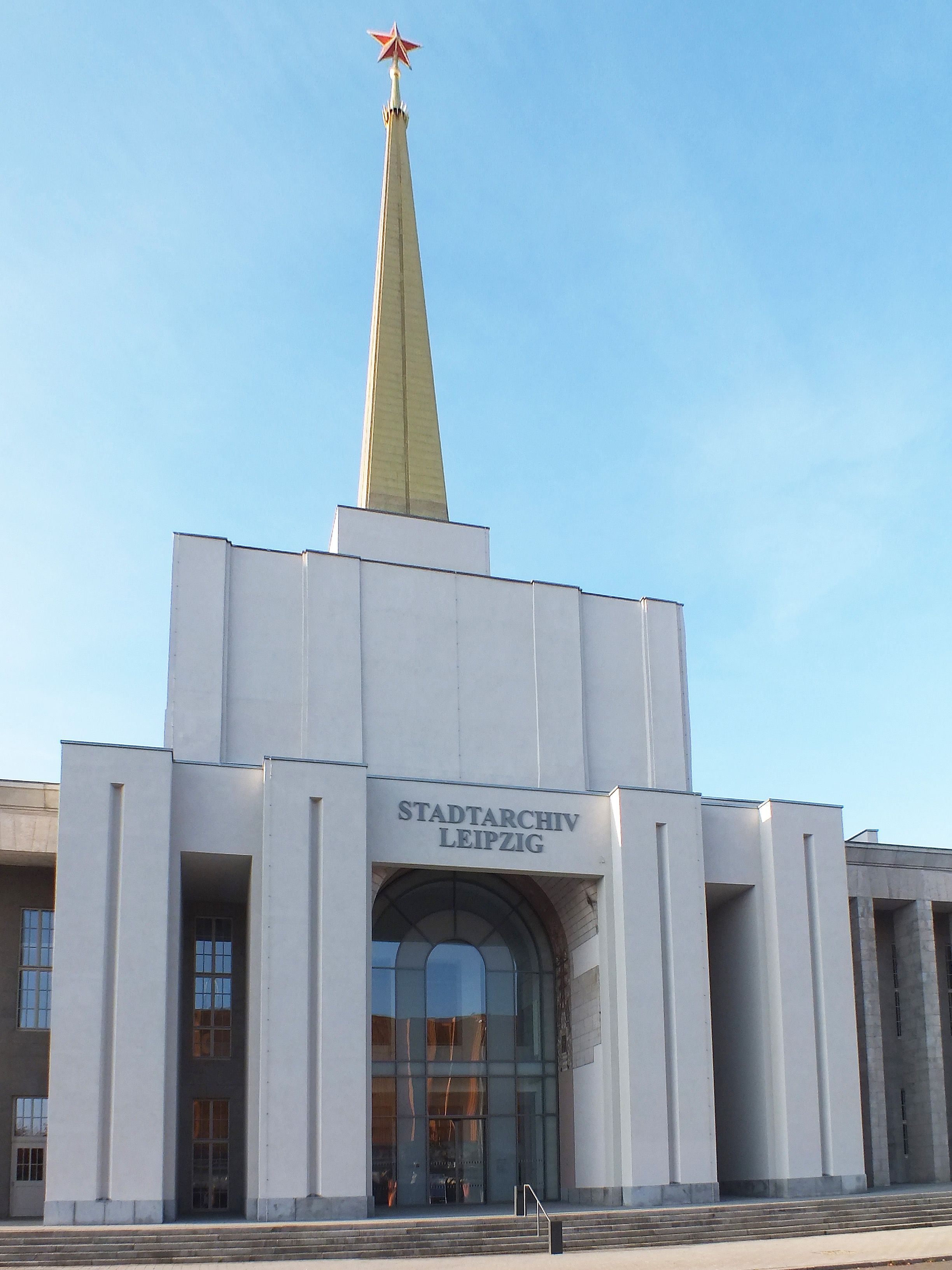 Eingangsfront des neuen Leipziger Stadtarchivs im ehemaligen sowjetischen Pavillon auf dem alten Messegelände Leipzig